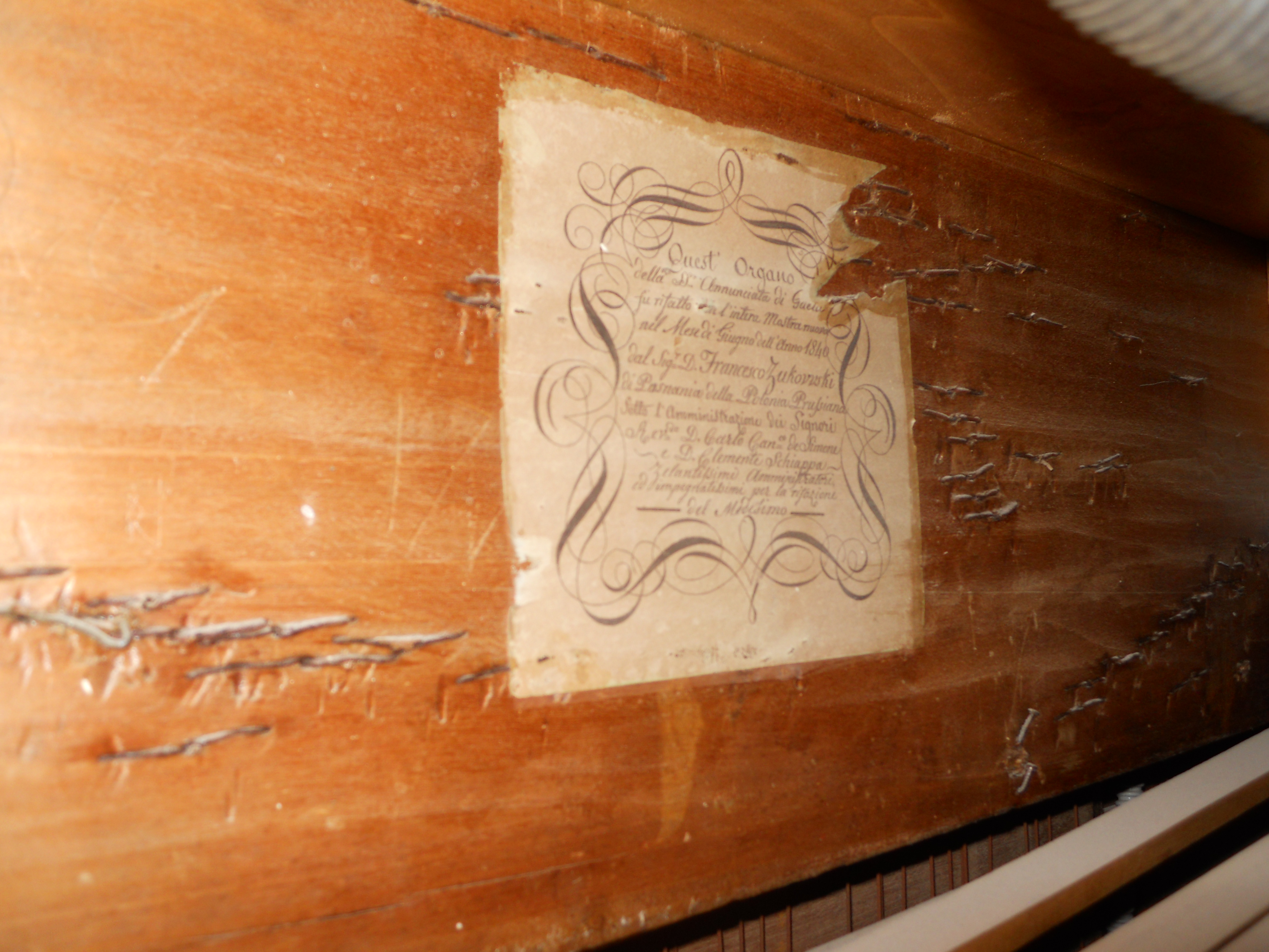 Cartiglio all'interno dell'organo del Santuario della Santissima Annunziata in Gaeta sui restauri ottocenteschi allo strumento